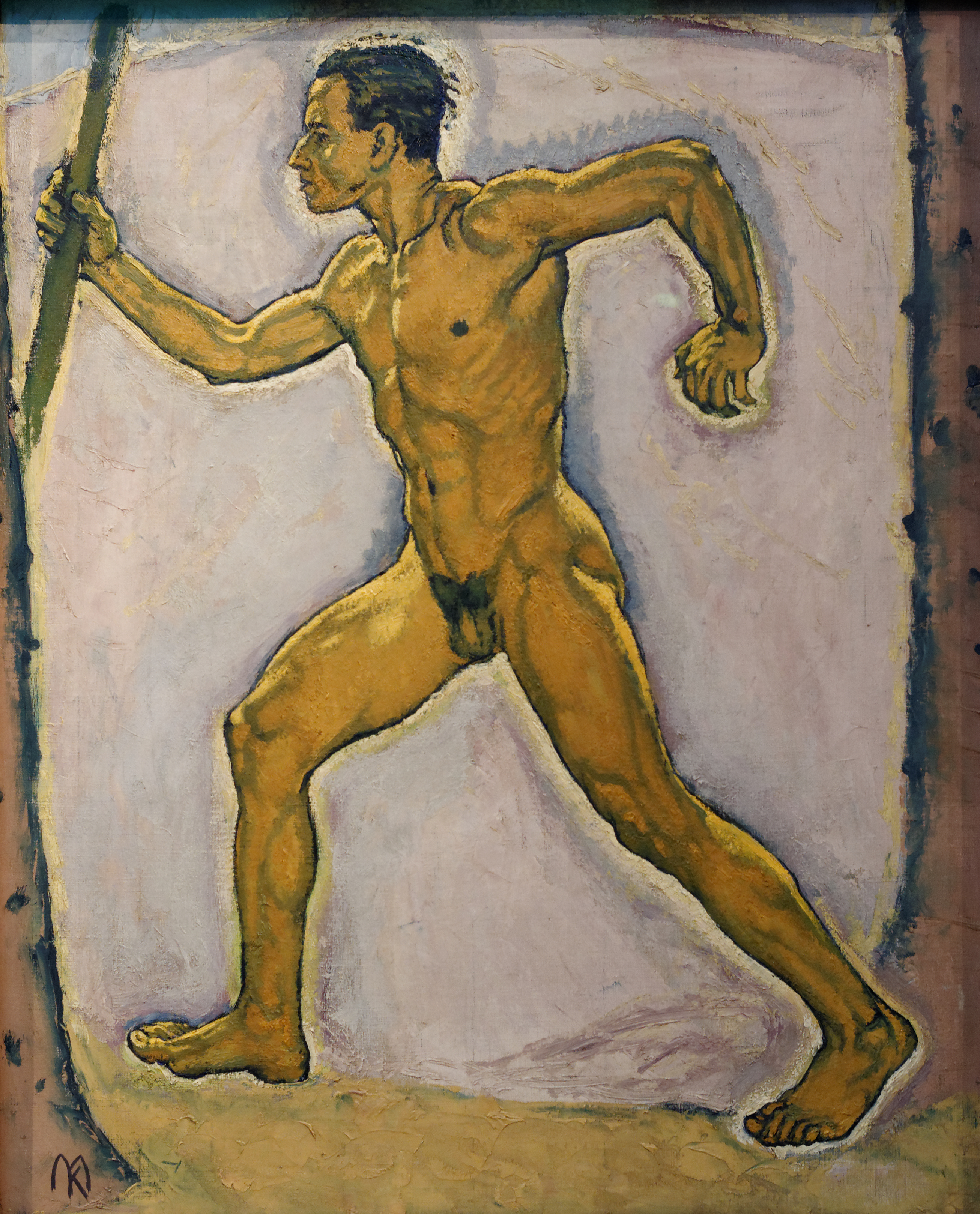 Le promeneur. Huile sur toile de Koloman Moser, c 1914. Leopold Museum, Vienne